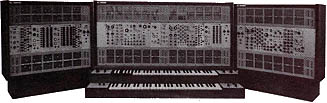 16:56, 3 cze 2003 Jonasz 327x103 (17870 bajtów)